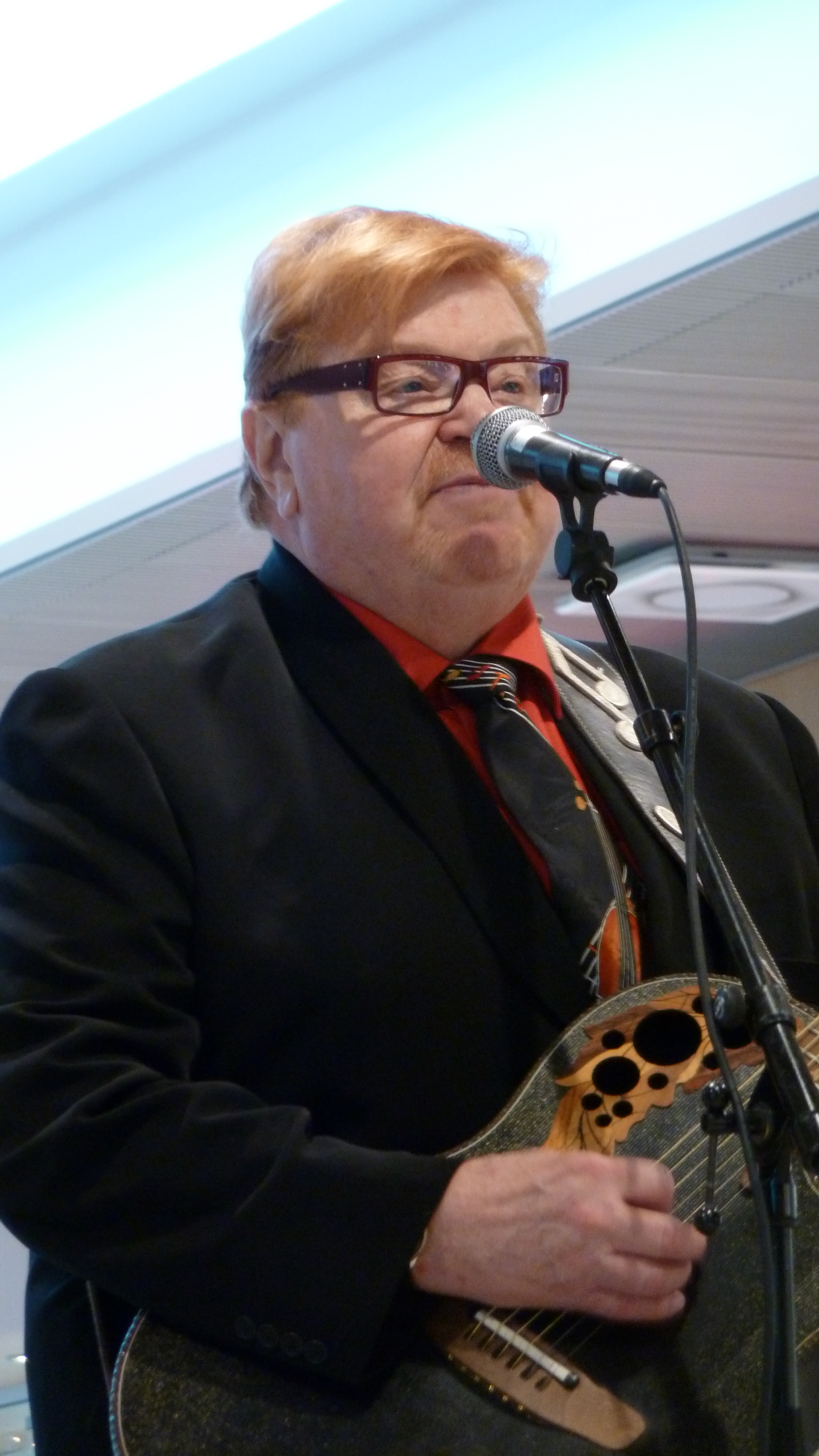 Jussi Raittinen, suomalainen laulaja